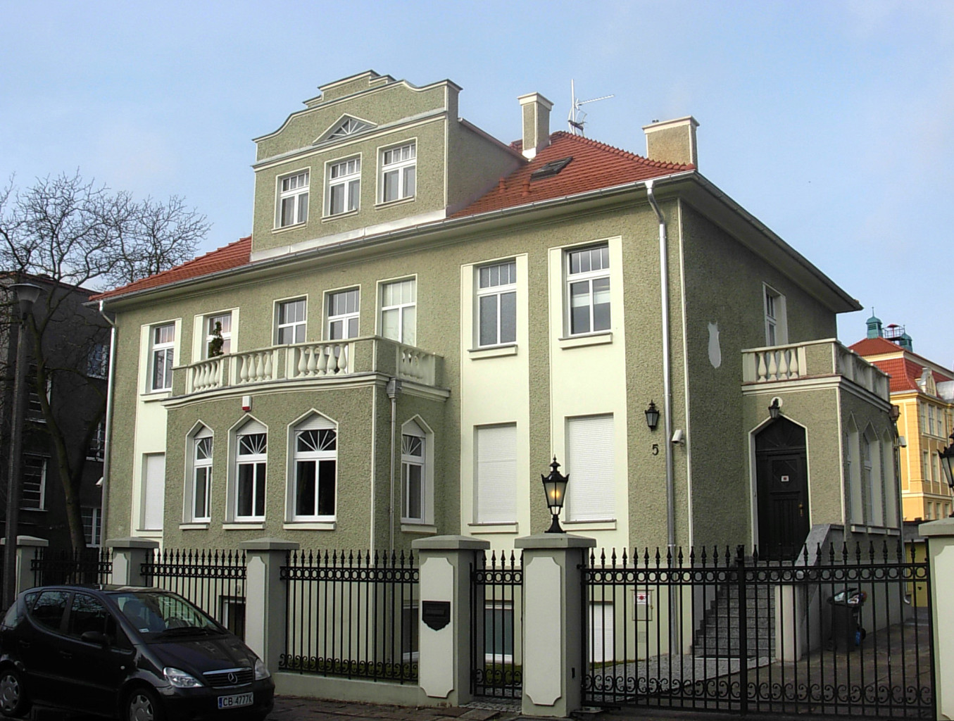 Willa ul. Adama Asnyka 5 w Bydgoszczy – zbud. 1927-1931, budowniczy Bronisław Jankowski